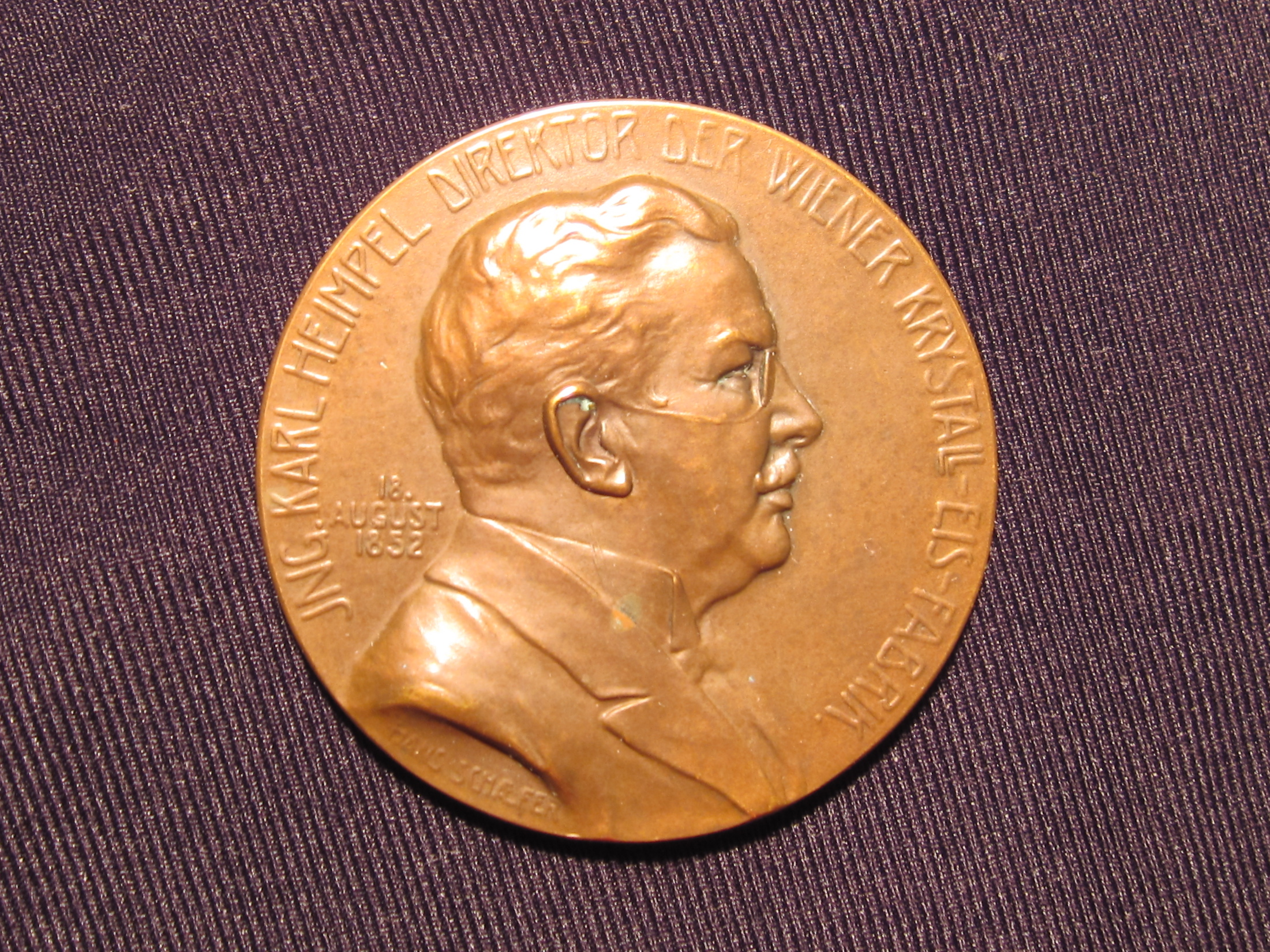 Ing. Karl Heimpel Direktor der Wiener Krystall-Eis-Fabrik 18. August 1852. Hans Schaefer.